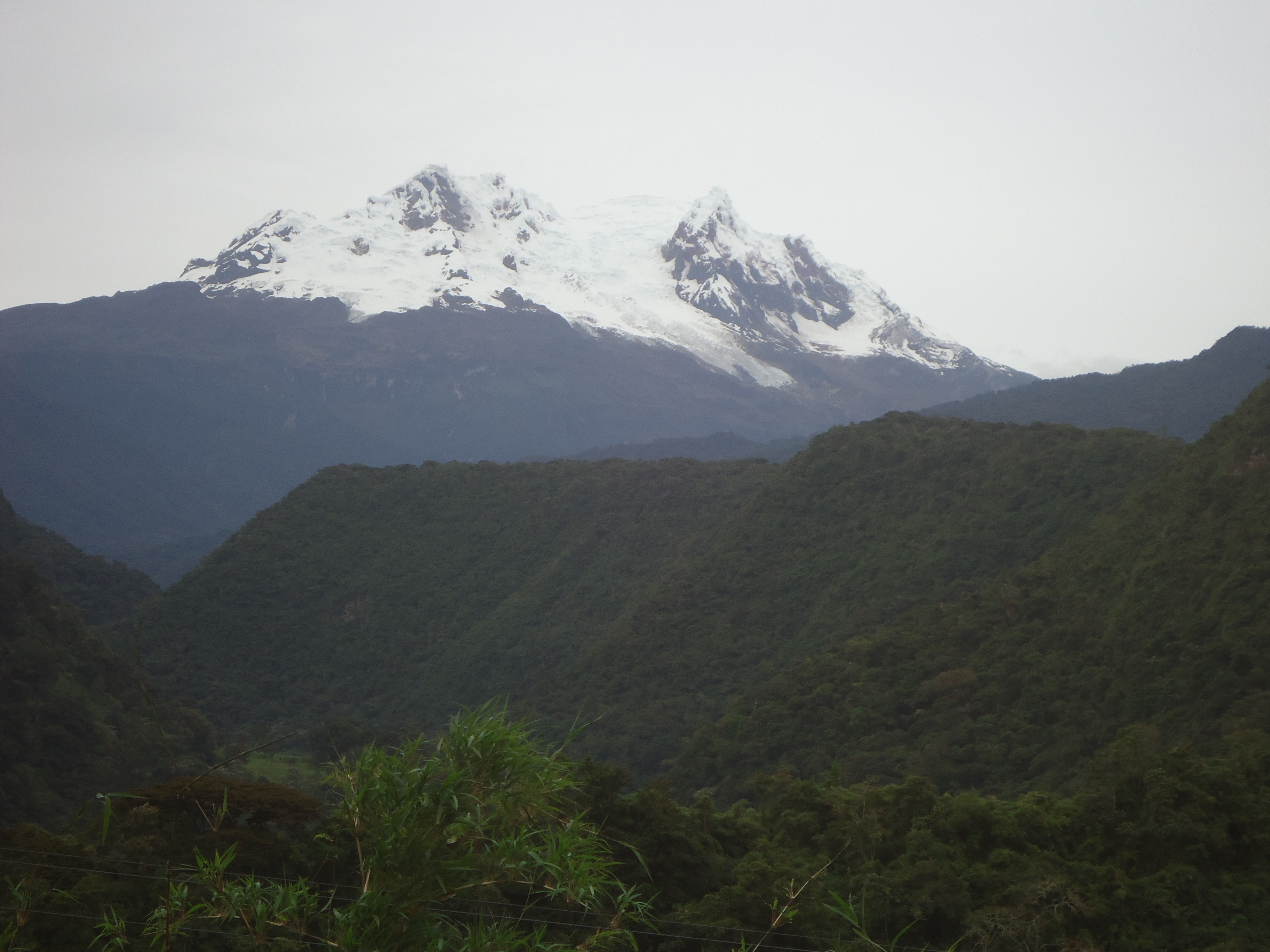 Volcán Antisana, Provincia de Napo